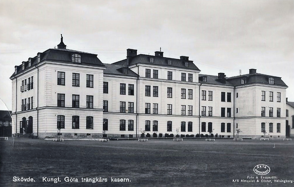 Göta trängkårs före detta kasern vid Högskolevägen i Skövde.